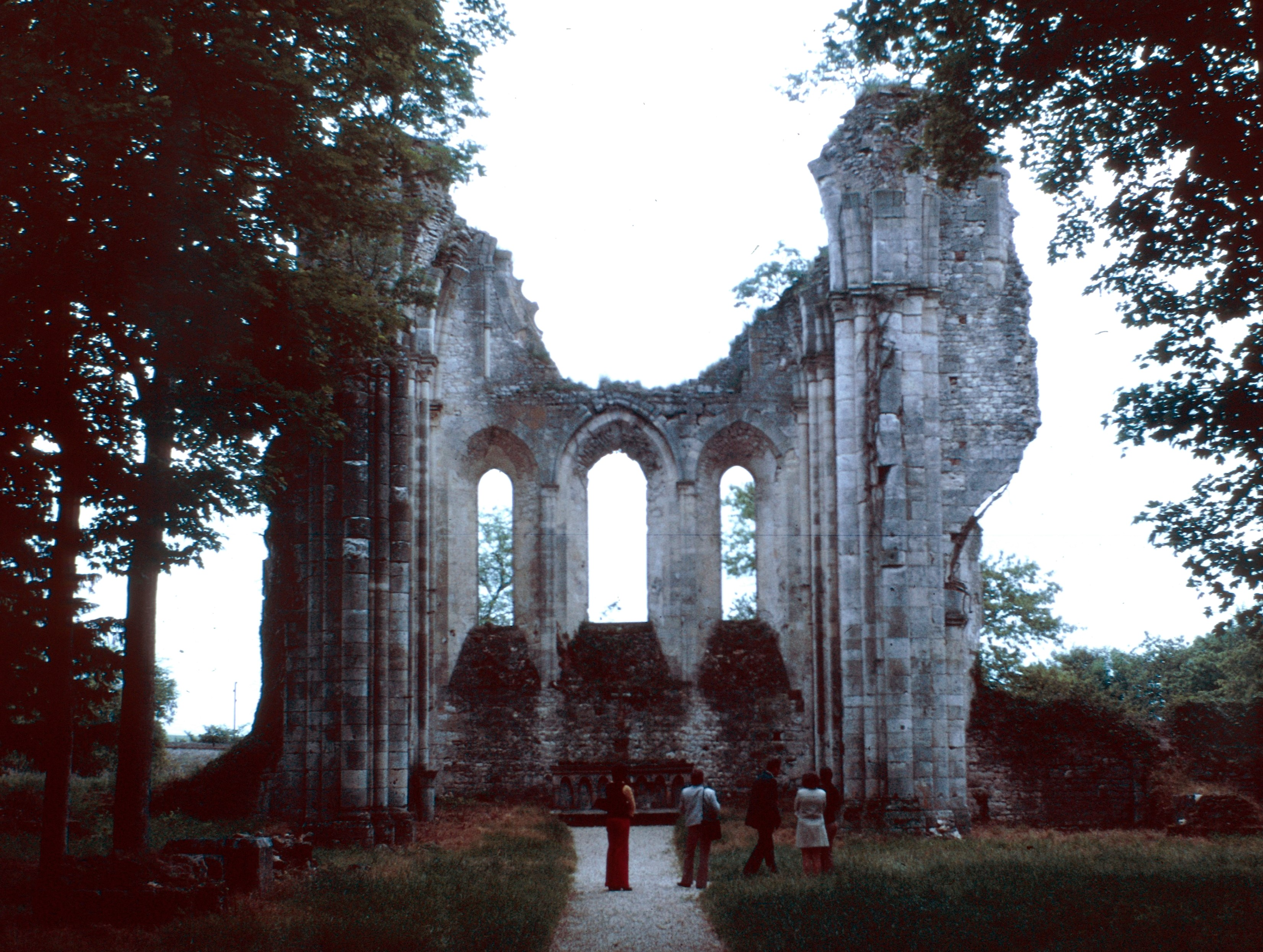 Abbaye de Preuilly à Egligny (Seine-et-Marne)